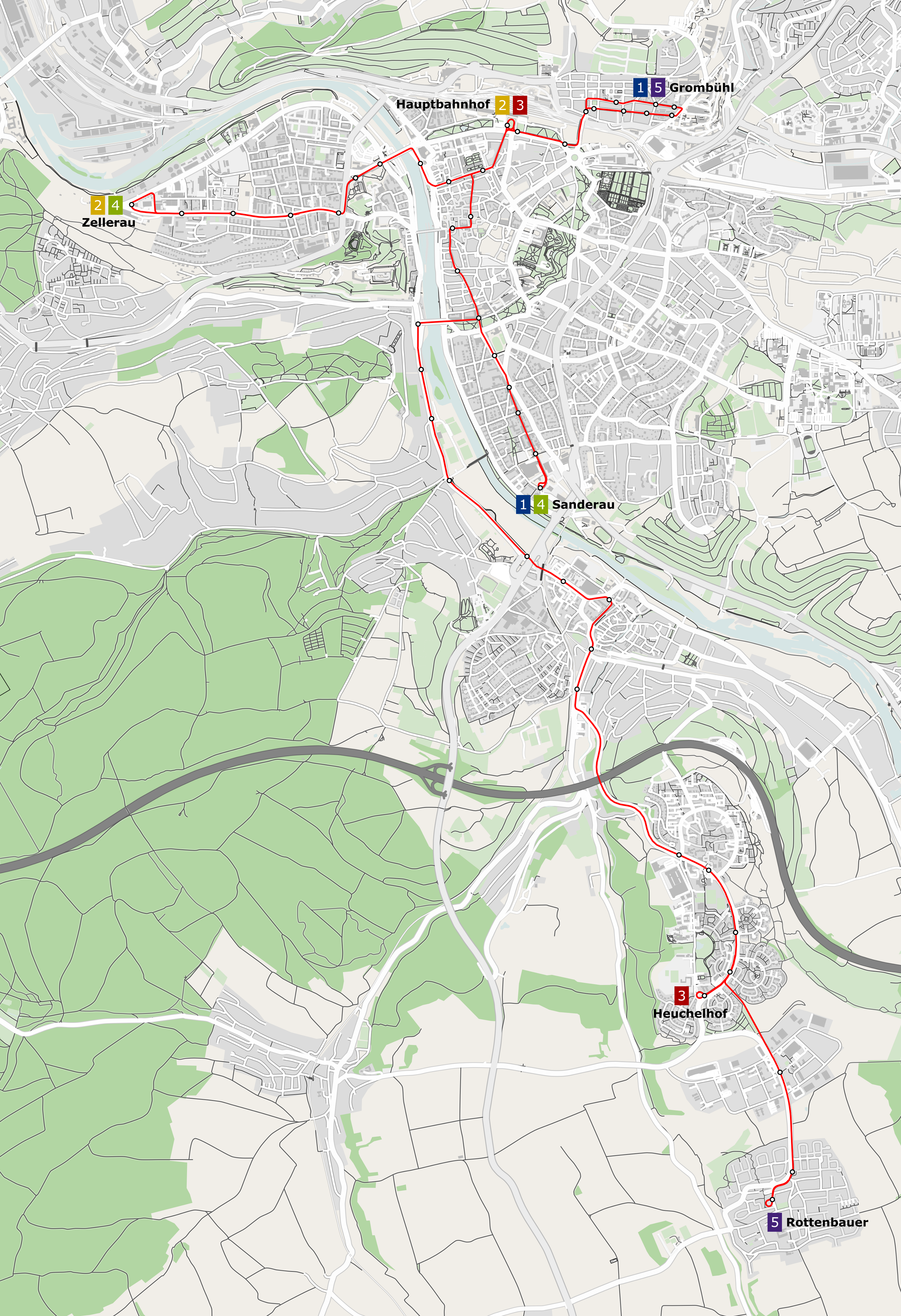 Karte der Würzburger Straßenbahn. This map of Würzburg, Germany was created from OpenStreetMap project data, collected by the community. This map may be incomplete, and may contain errors. Don't rely solely on it for navigation.